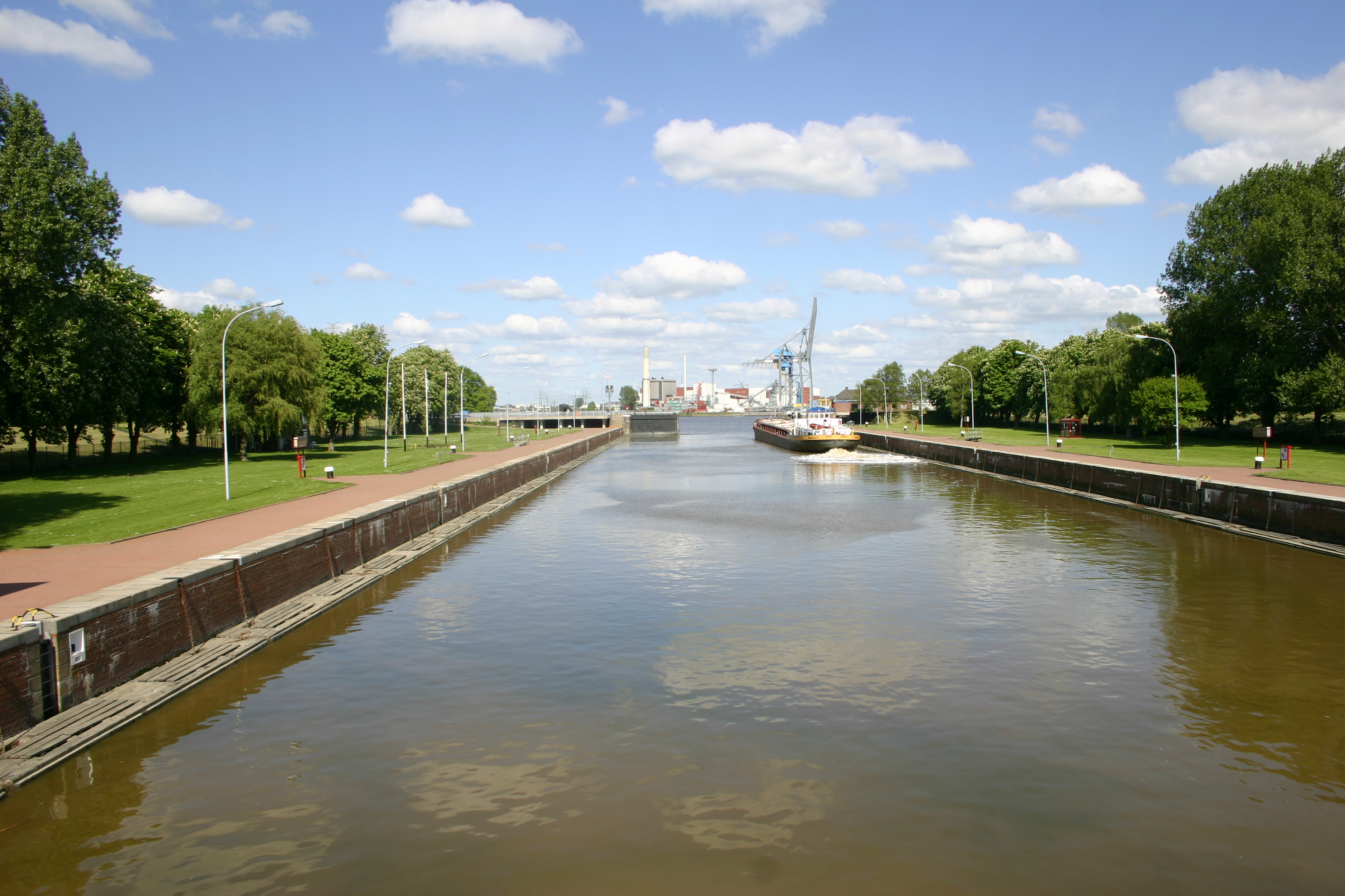 Grosse Seeschleuse in Emden, Ostfriesland, Niedersachsen